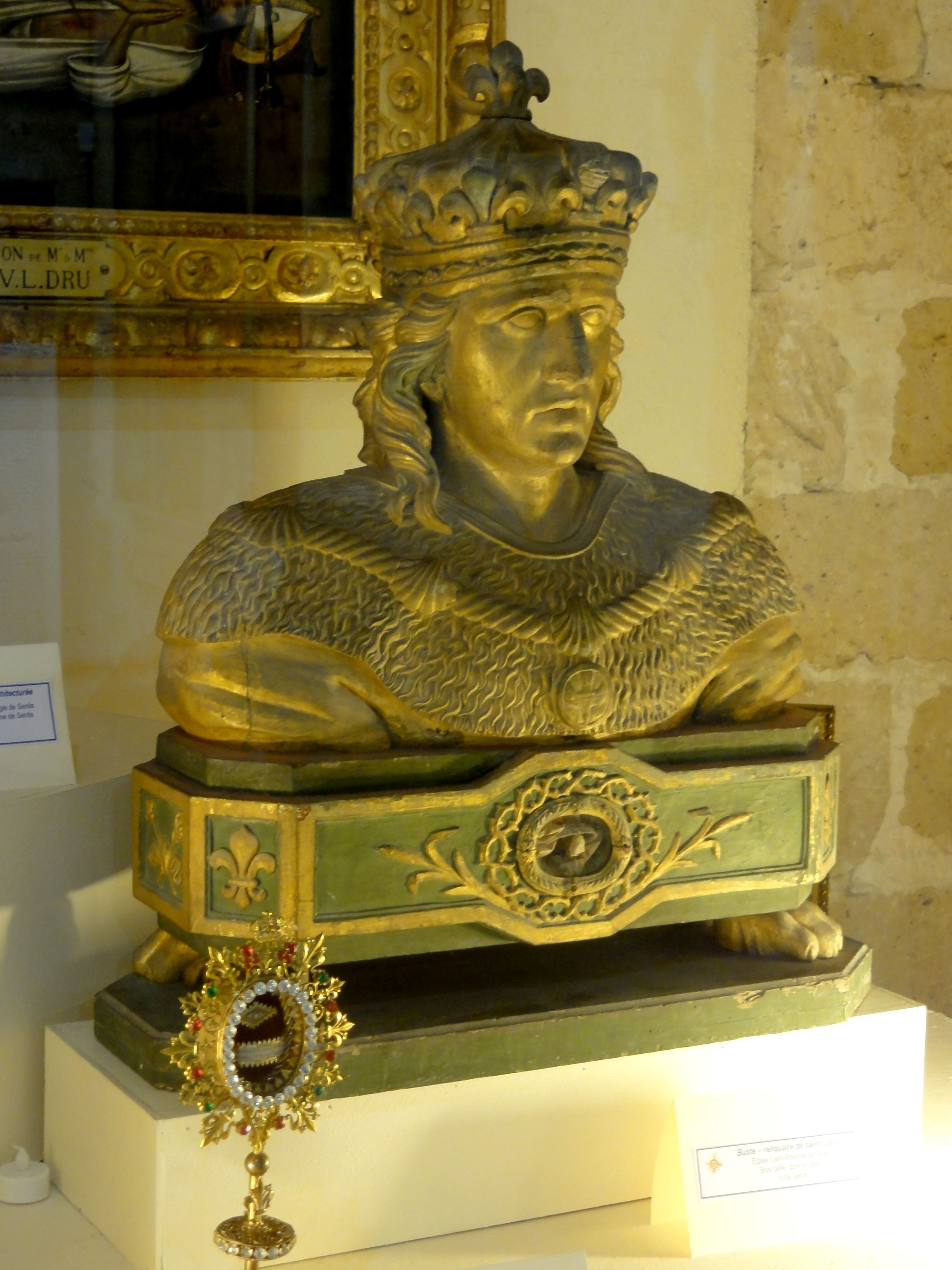 Buste-reliquaire de saint Louis, bois doré, XIXe s.